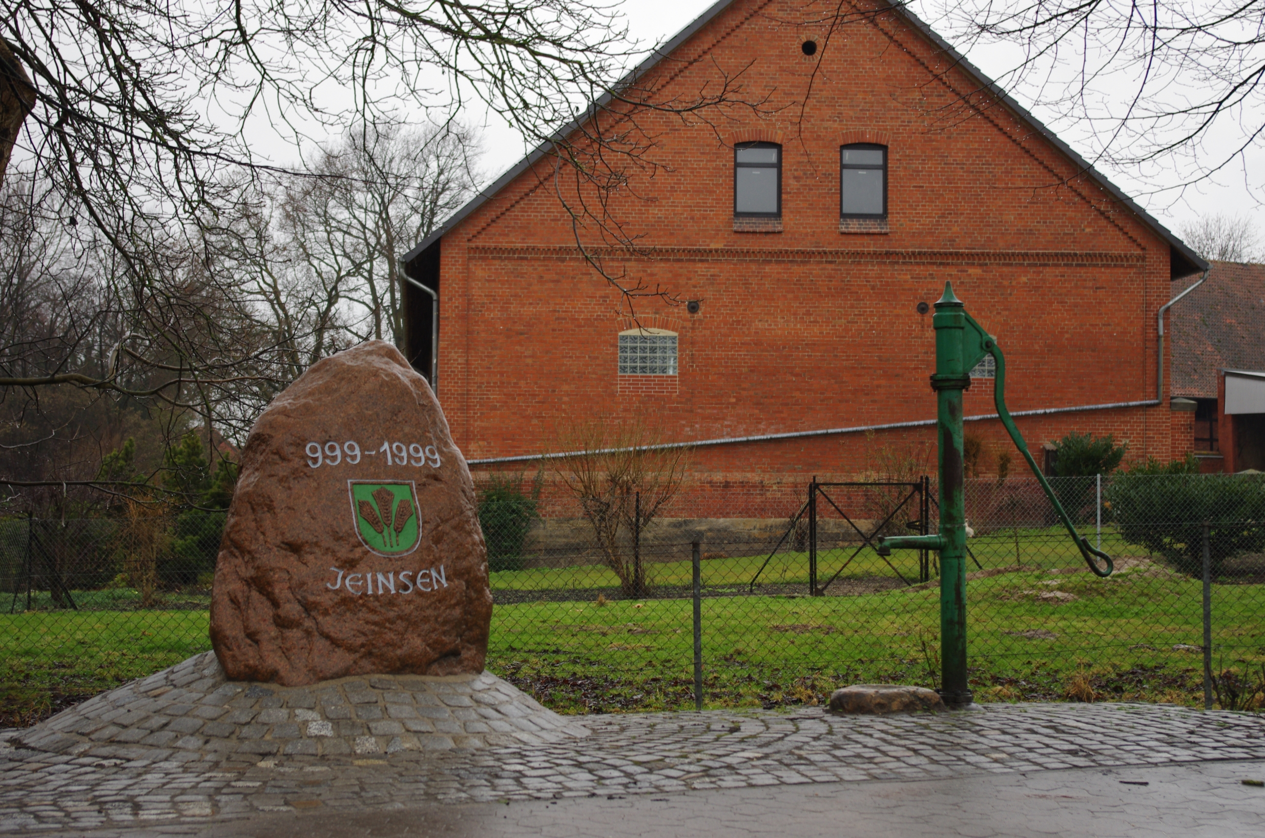 Pattensen Ortsteil Jeinsen in Niedersachsen. Der Gedenkstein erinnern an die 1000 Jahre Jeinsen.